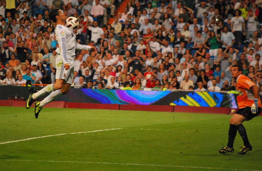 Contrôle de Cristiano Ronaldo face à Esteban lors d'un match entre le Real Madrid et l'UD Almería.